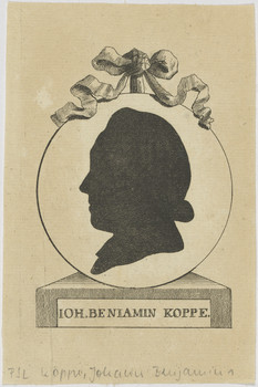 Schattenriss des Theologen Johann Benjamin Koppe (um 1783/84)